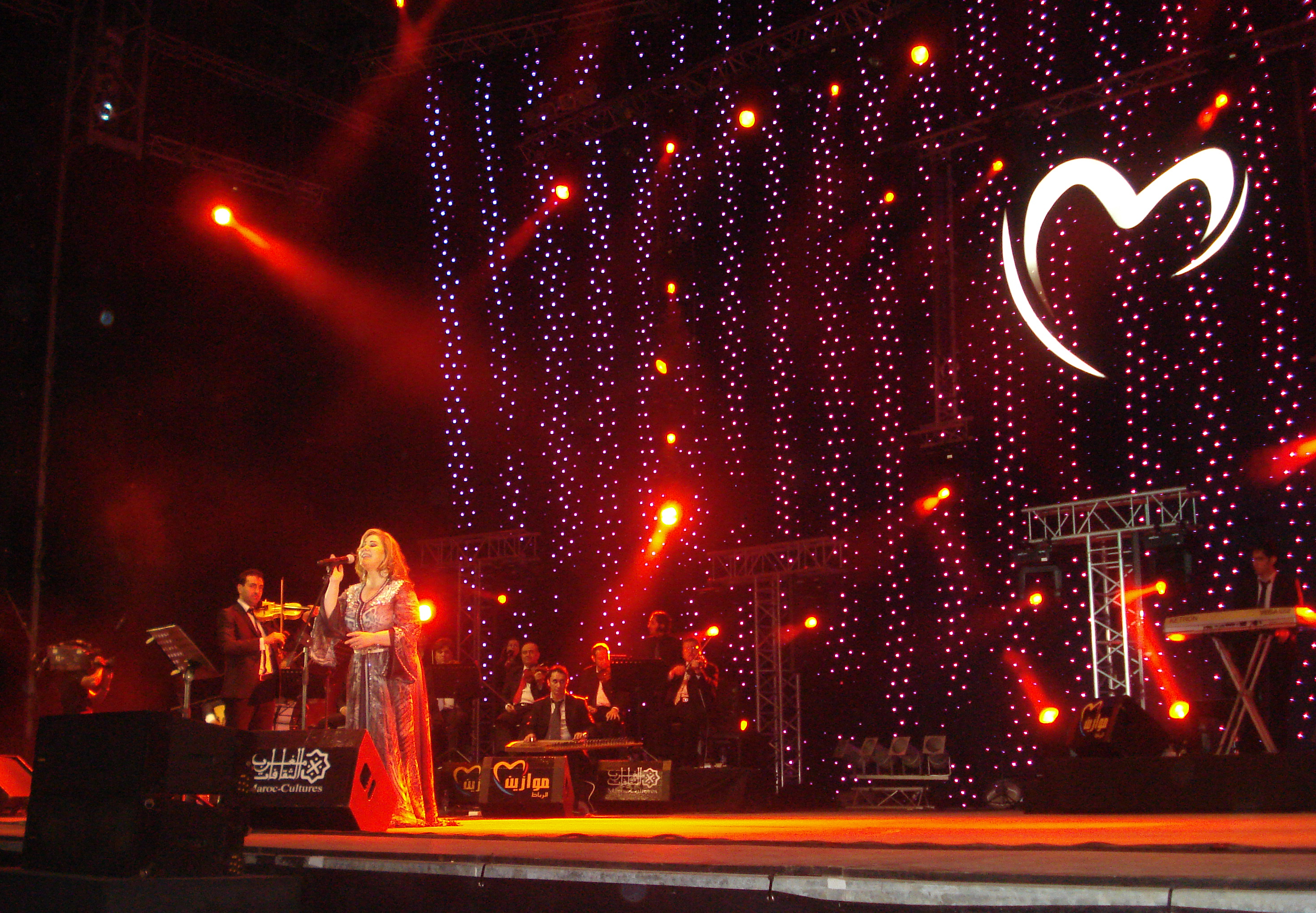 [Naoufel Cherkaoui] Syrian singer Mayada El-Hanaoui is just one of dozens of international performers at this year's Mawazine festival. المطربة السورية ميادة الحناوي هي واحدة فقط من عشرات المطربين الدوليين الذين يشاركون في دورة موازين لهذا العام. La chanteuse syrienne Mayada El-Hanaoui est l'une des dizaines d'artistes internationaux qui se produiront cette année lors du festival Mawazine.